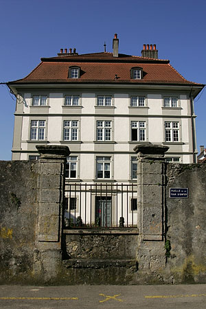 Moudon: stattliches Haus